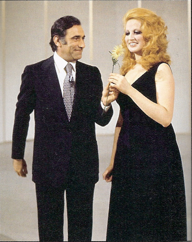 Alberto Lupo con Mina durante la conduzione di Teatro 10 nel 1972.